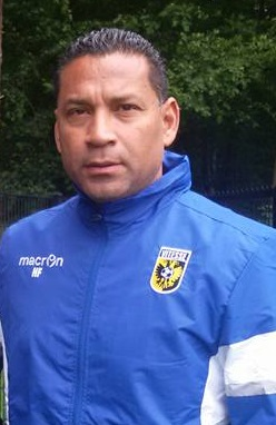 Henk Fraser als coach van SBV Vitesse.